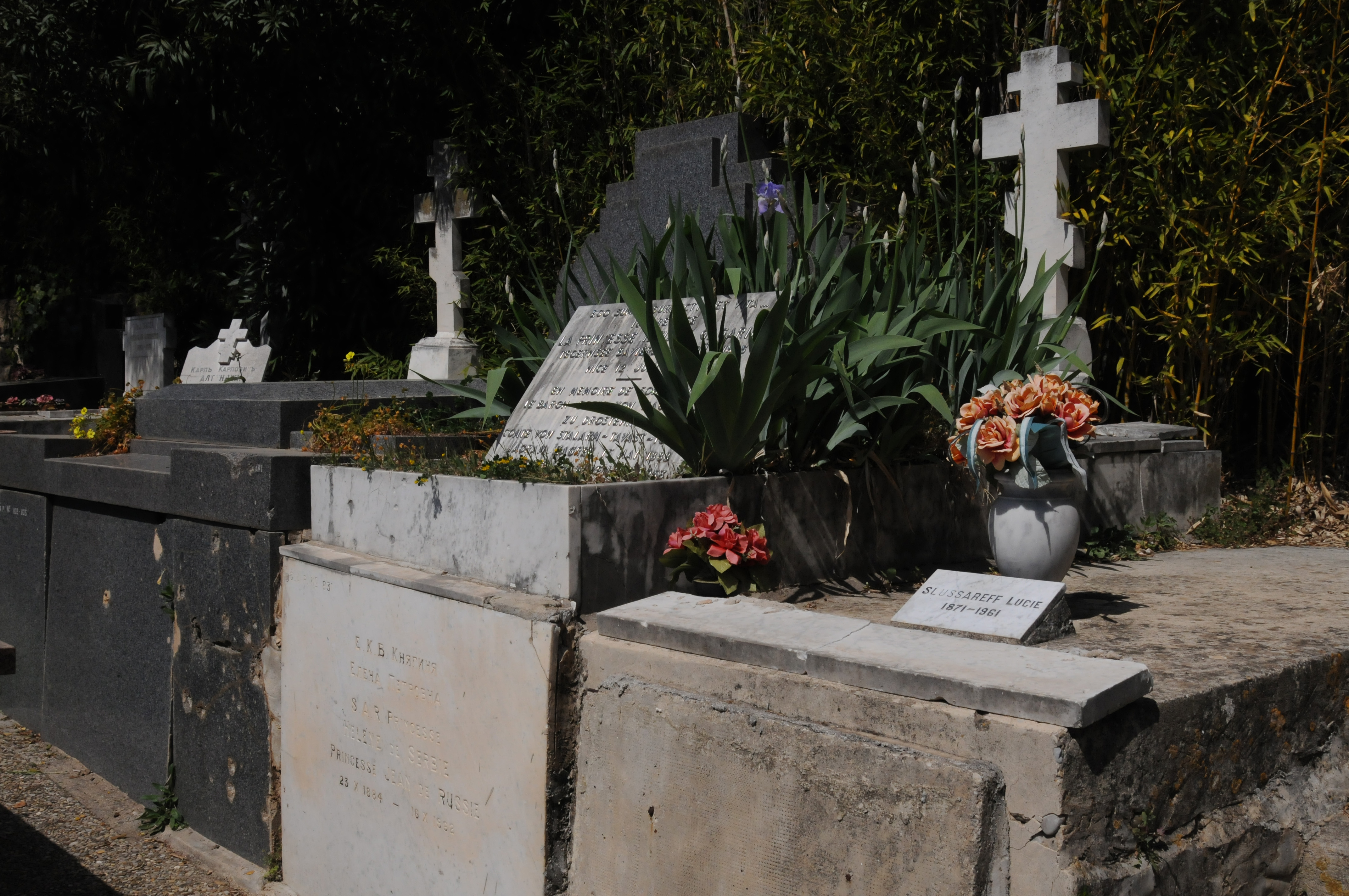 Могила Елены Петровны Сербской (1884—1962). Ницца, Русское кладбище Кокад.